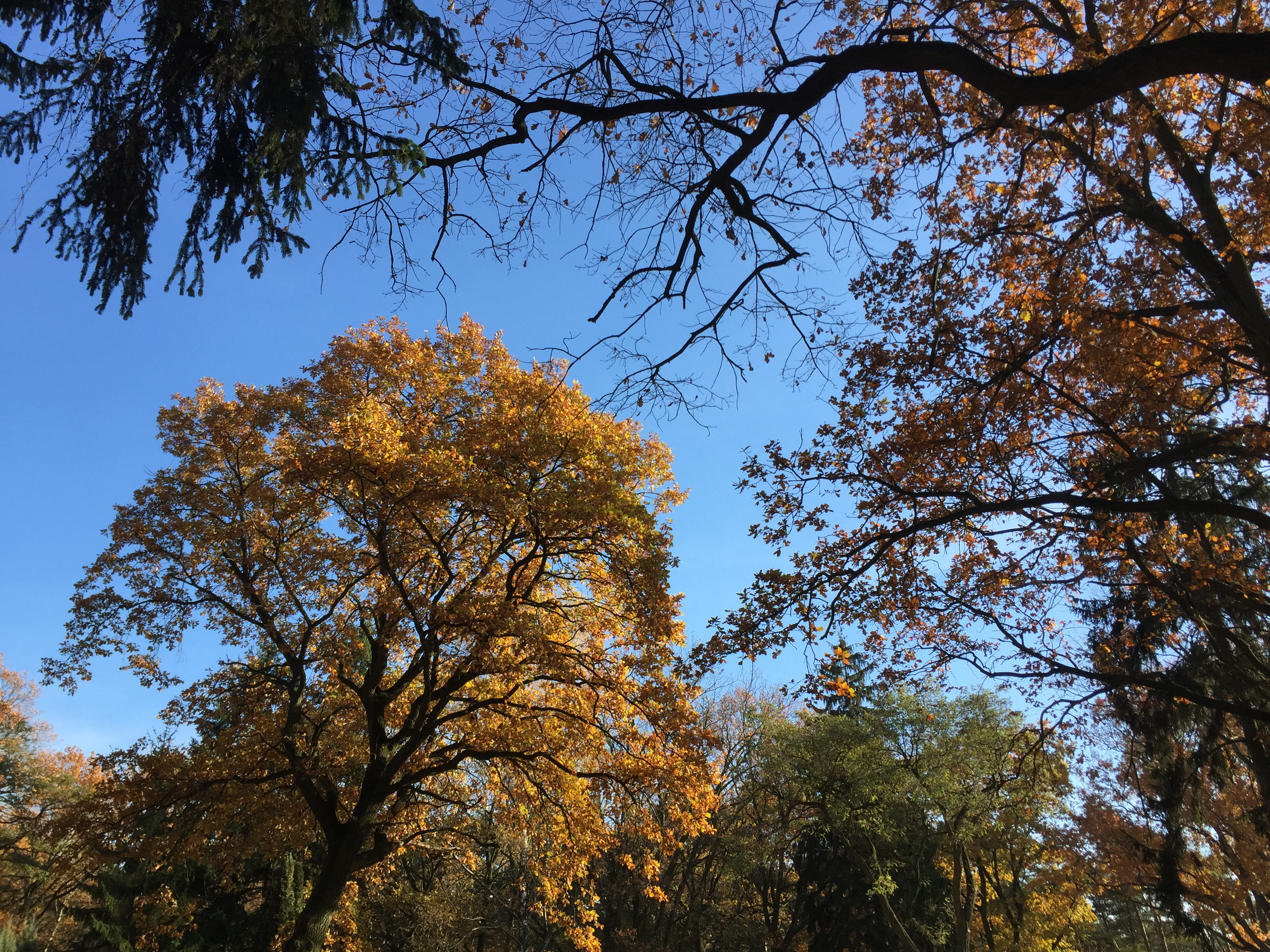 Cmentarz zaniemyski na początku listopada z przebarwionymi drzewami.